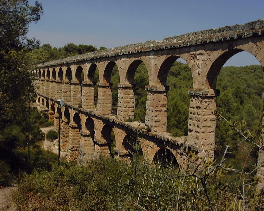 Pont del Diable nahe Tarragona / Spanien